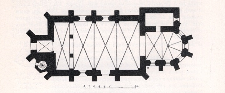 Páleč, půdorys